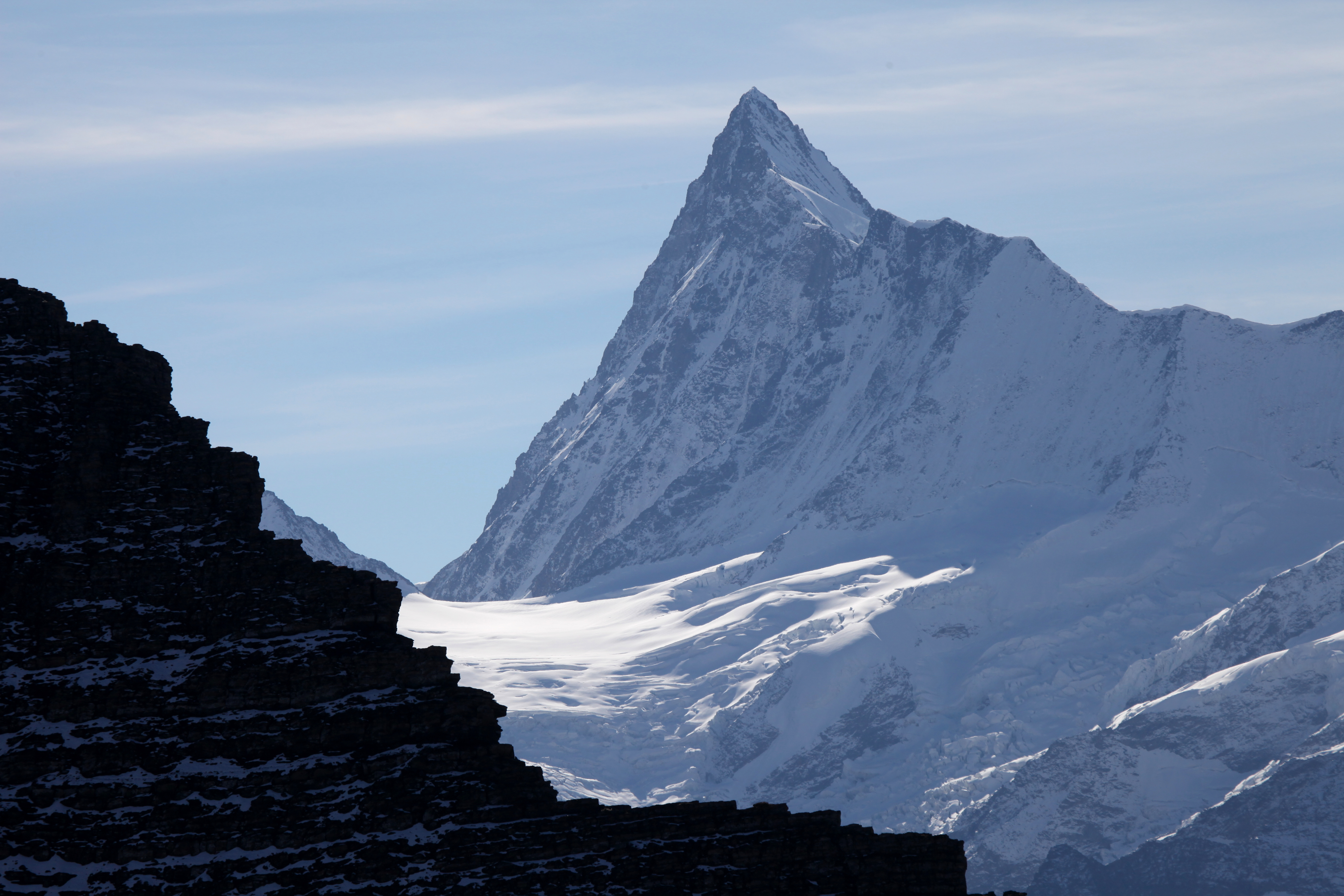 Le Finsteraarhorn vu depuis le Faulhorn.